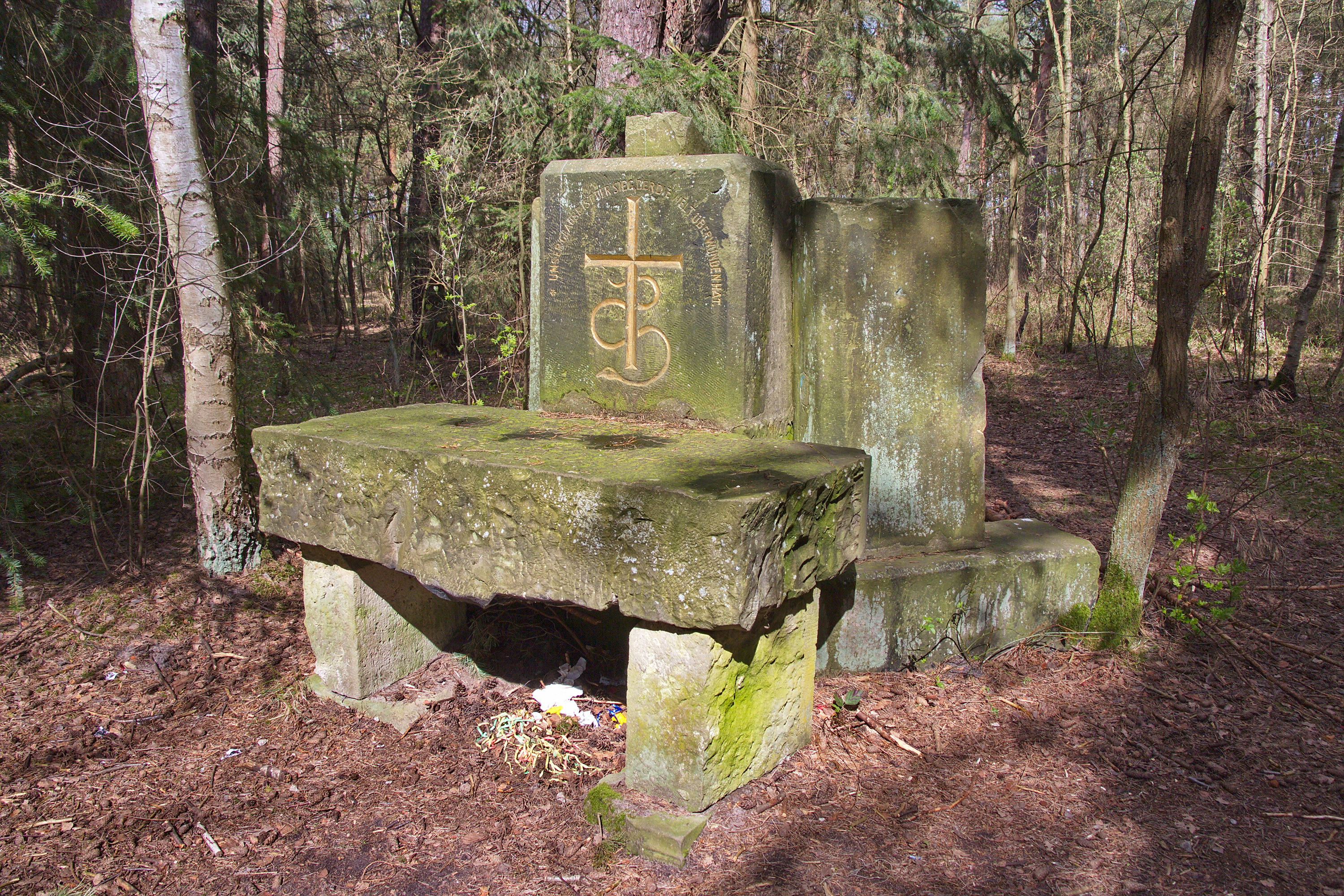 Die Eichenkreuzburg von 1928 ist eine Jugendburg mit hohen Wehrturm in Bissendorf-Wietze (Wedemark), Niedersachsen, Deutschland.